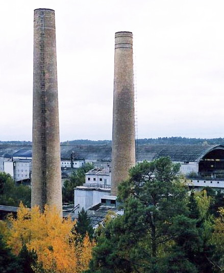 Stora Vika, cementfabriken hösten 2002. De två 60 meter höga skorstenarna. Foto: Cucumber.